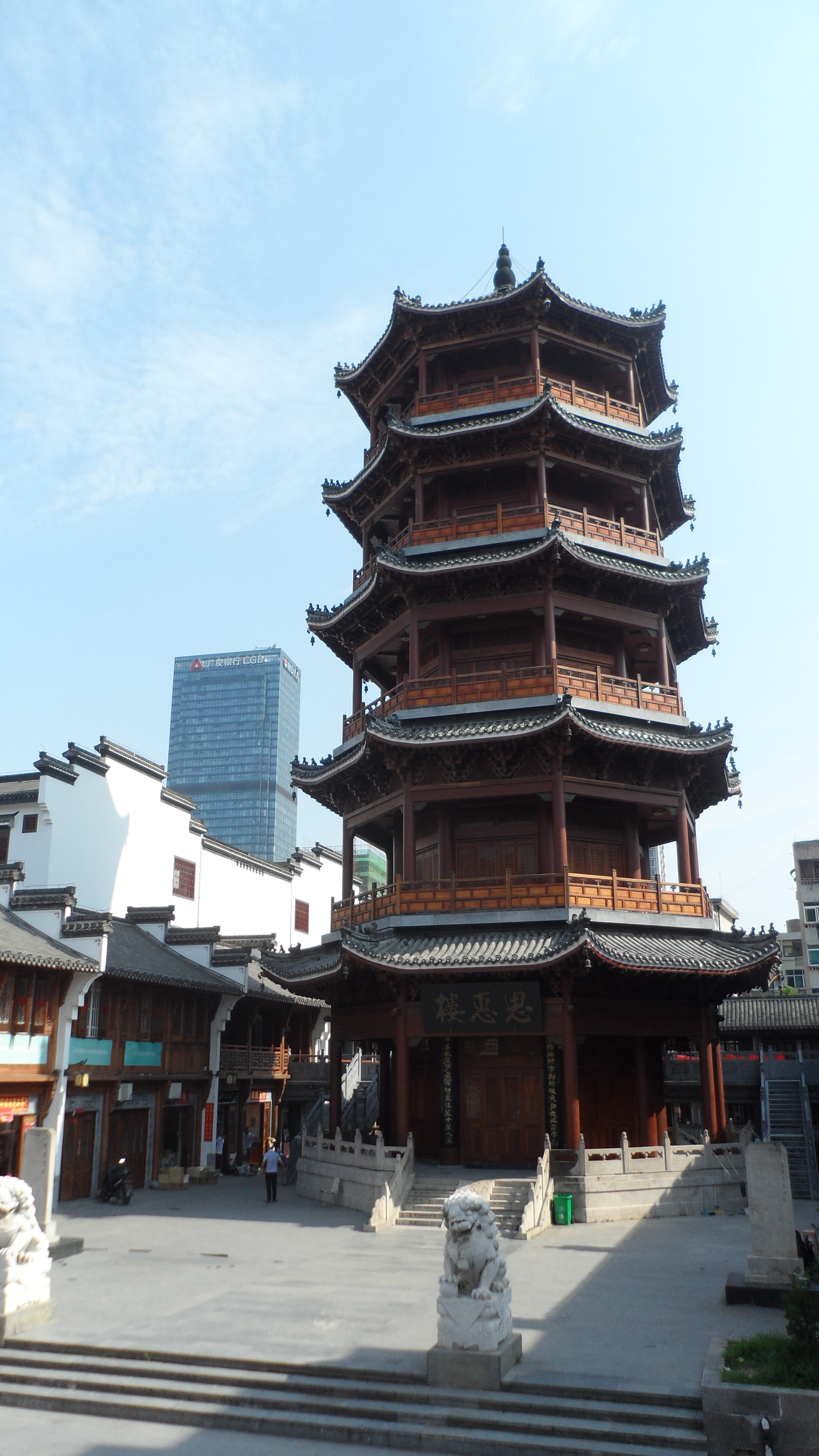 合肥城隍庙戏楼后的思惠楼